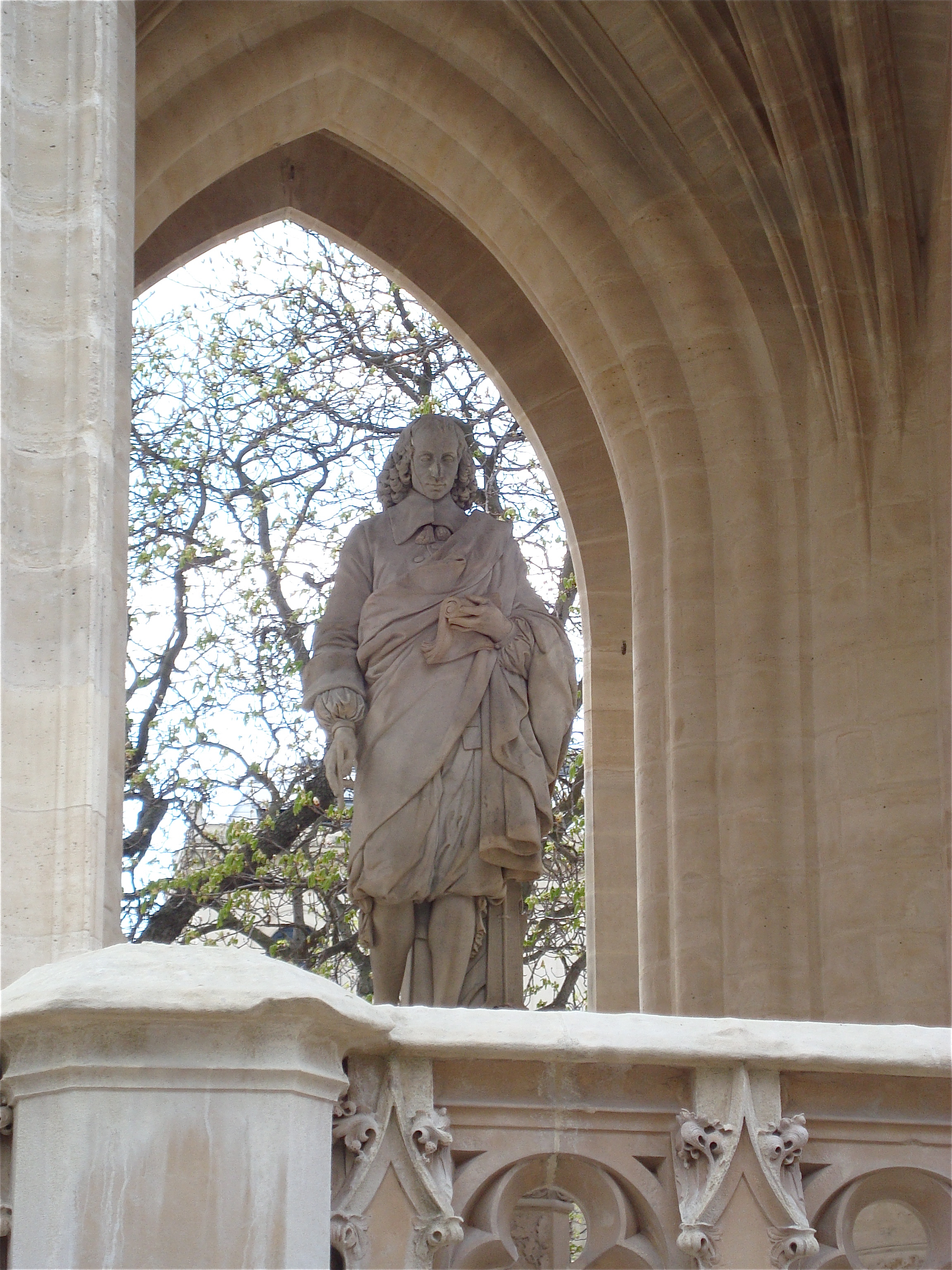 Statue de Blaise Pascal par Jules Cavelier (1857) sous la Tour Saint-Jacques à Paris